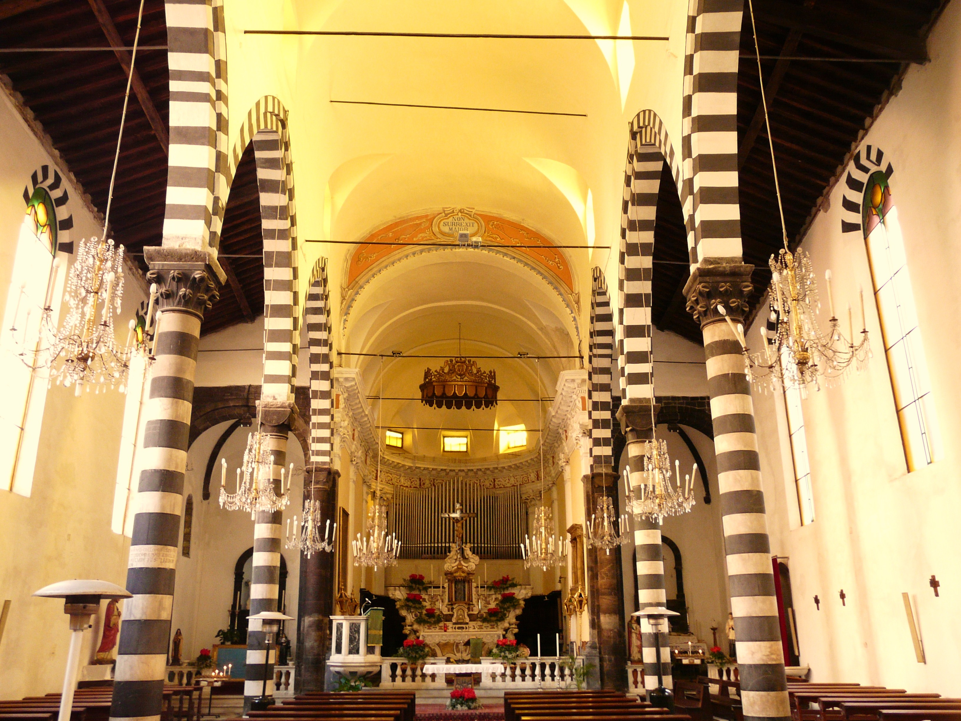 Navata centrale della chiesa di San Giovanni Battista, Monterosso al Mare, Cinque Terre, La Spezia, Liguria, Italia